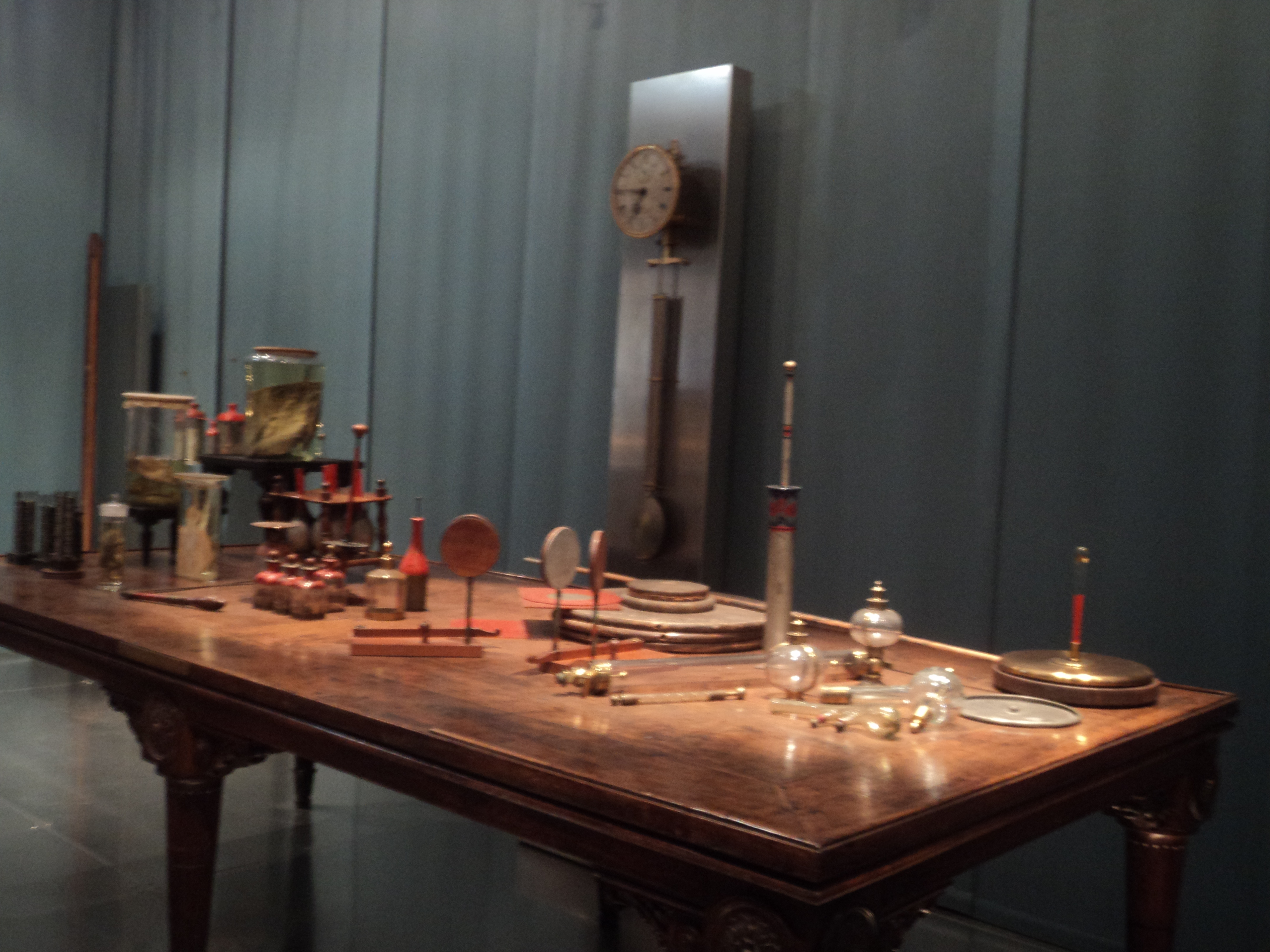 Strumenti di Alessandro Volta nel Gabinetto di Fisica dell'Università di Pavia, all'interno del Museo per la Storia dell'Università di Pavia. Si vedono, tra gli altri, l'elettroforo e l'eudiometro.